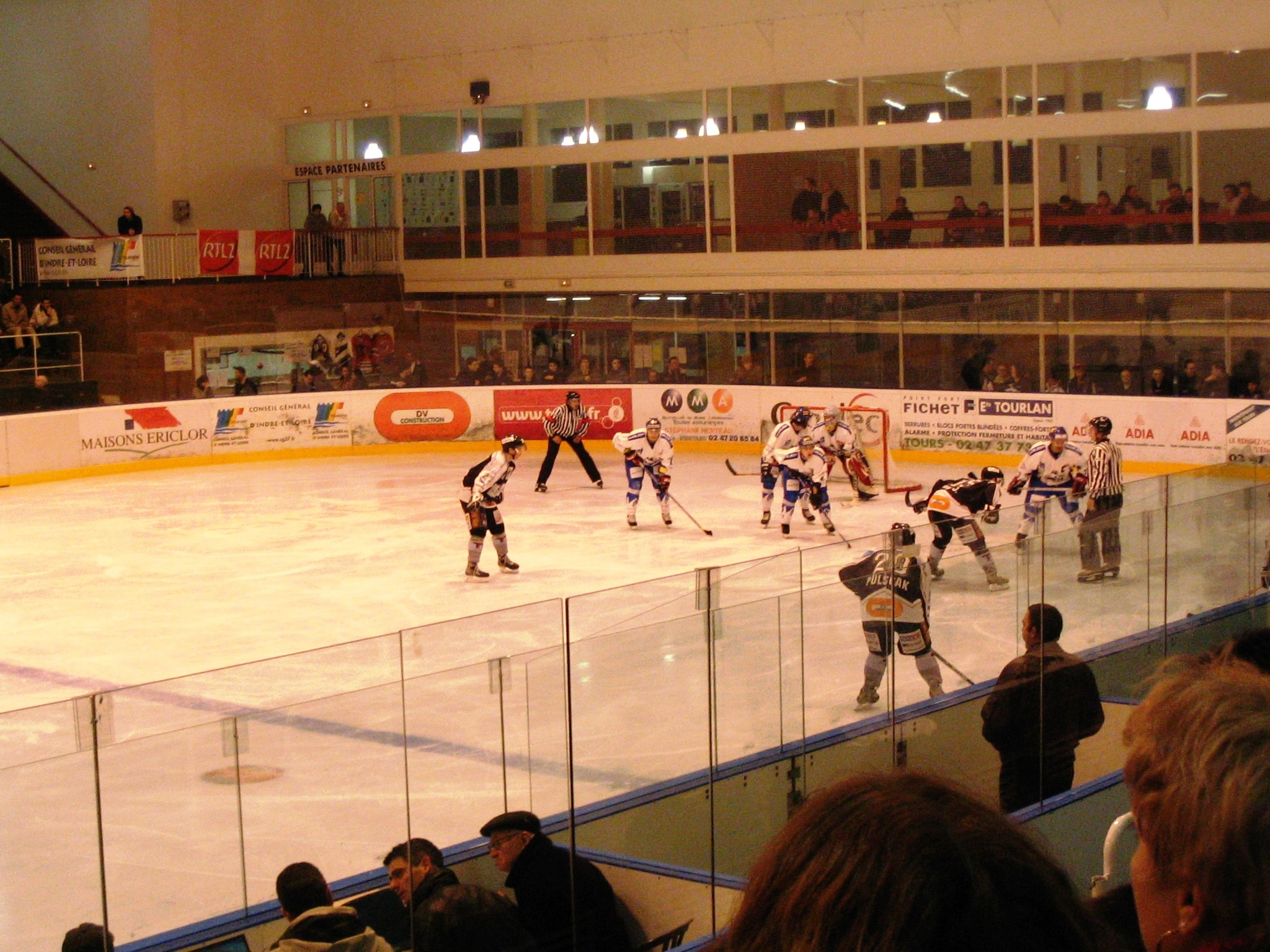 Match Diables noirs de Tours vs Rapaces de Gap